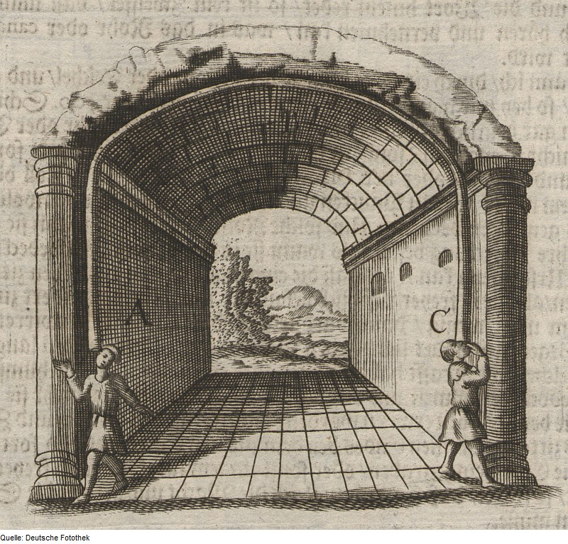 Original image description from the Deutsche Fotothek Akustik & Sprachrohr & Kommunikationsrohr & Ordensliteratur